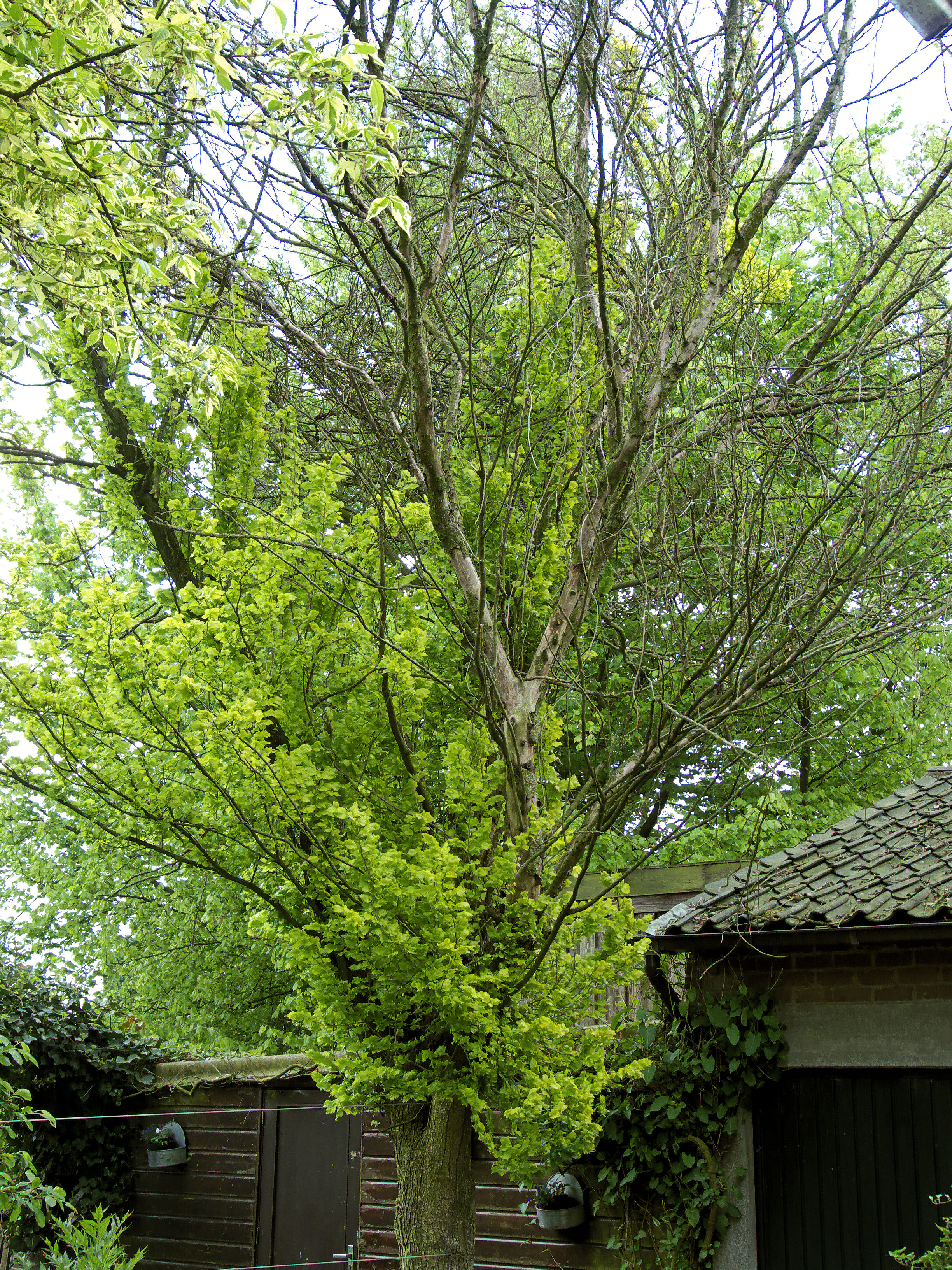 Iepziekte op goudiep (Ophiostoma ulmi on Ulmus hollandica 'Wredei'